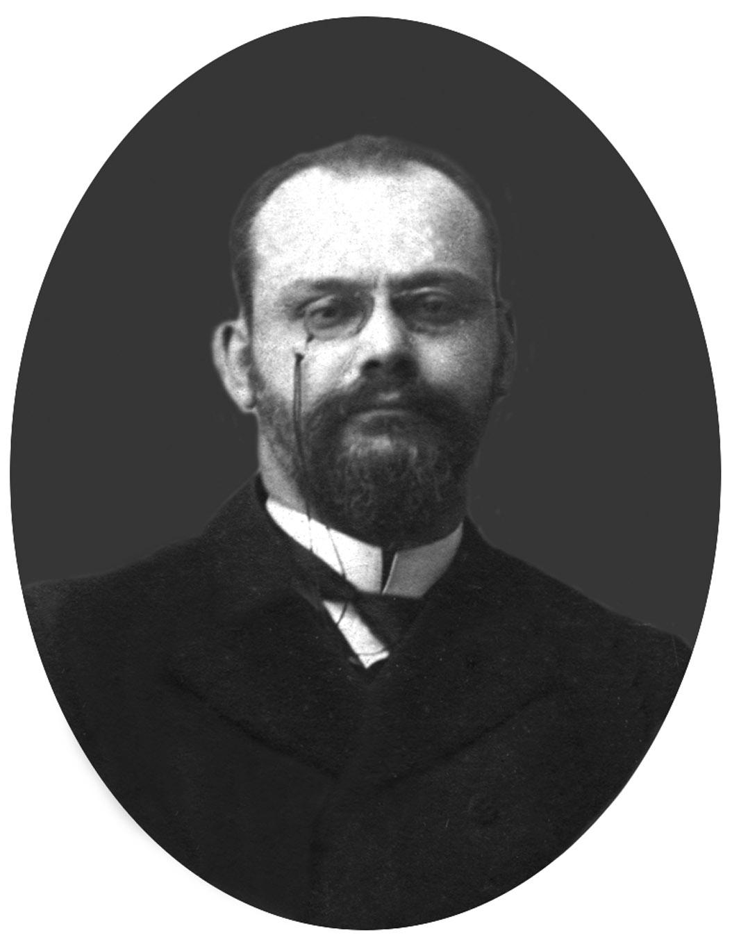 Фотопортрет Н. А. Котляревского с группового снимка выпуска Курсов Лесгафта 1903 года